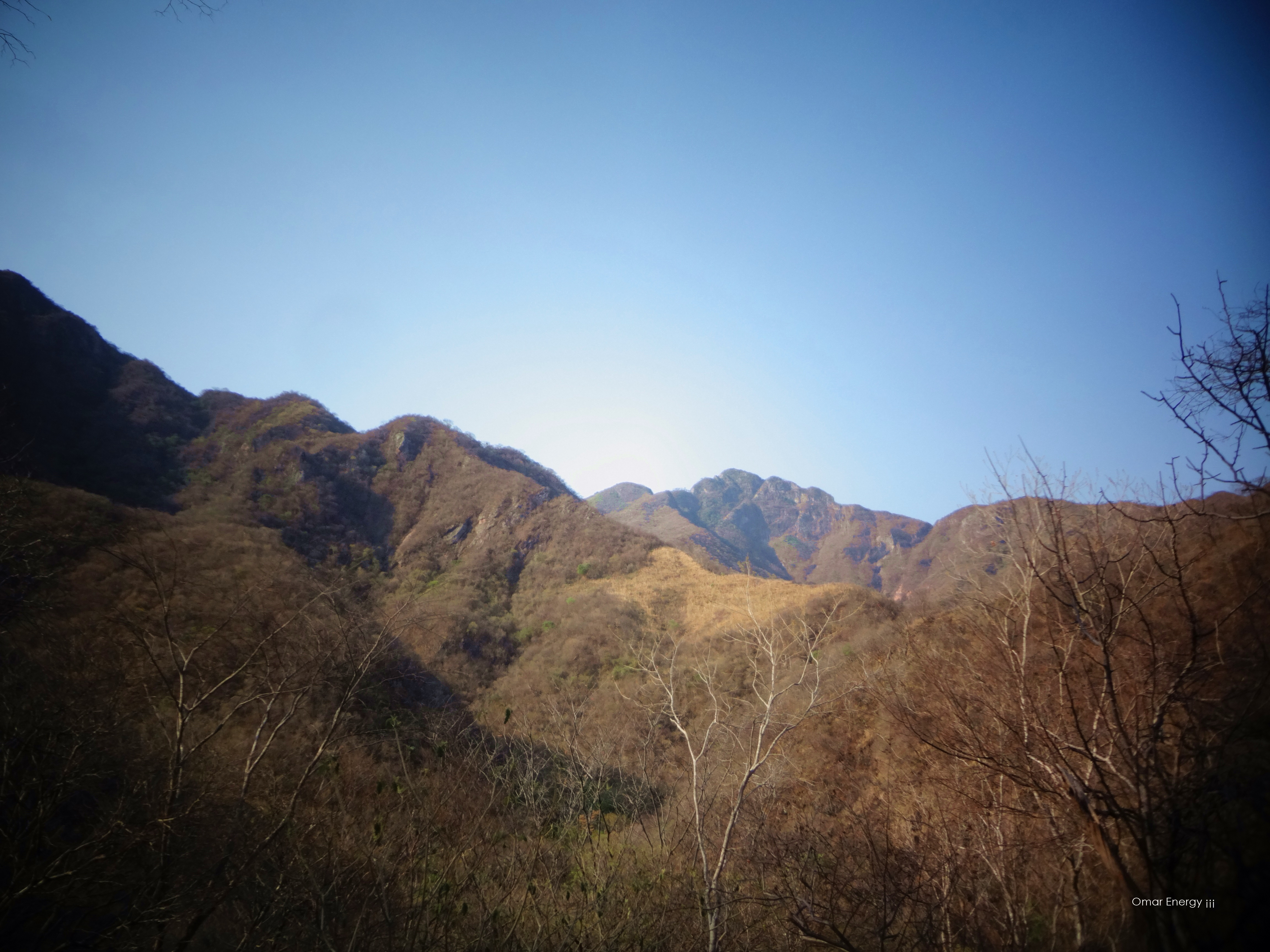 Sígueme en mi pagina